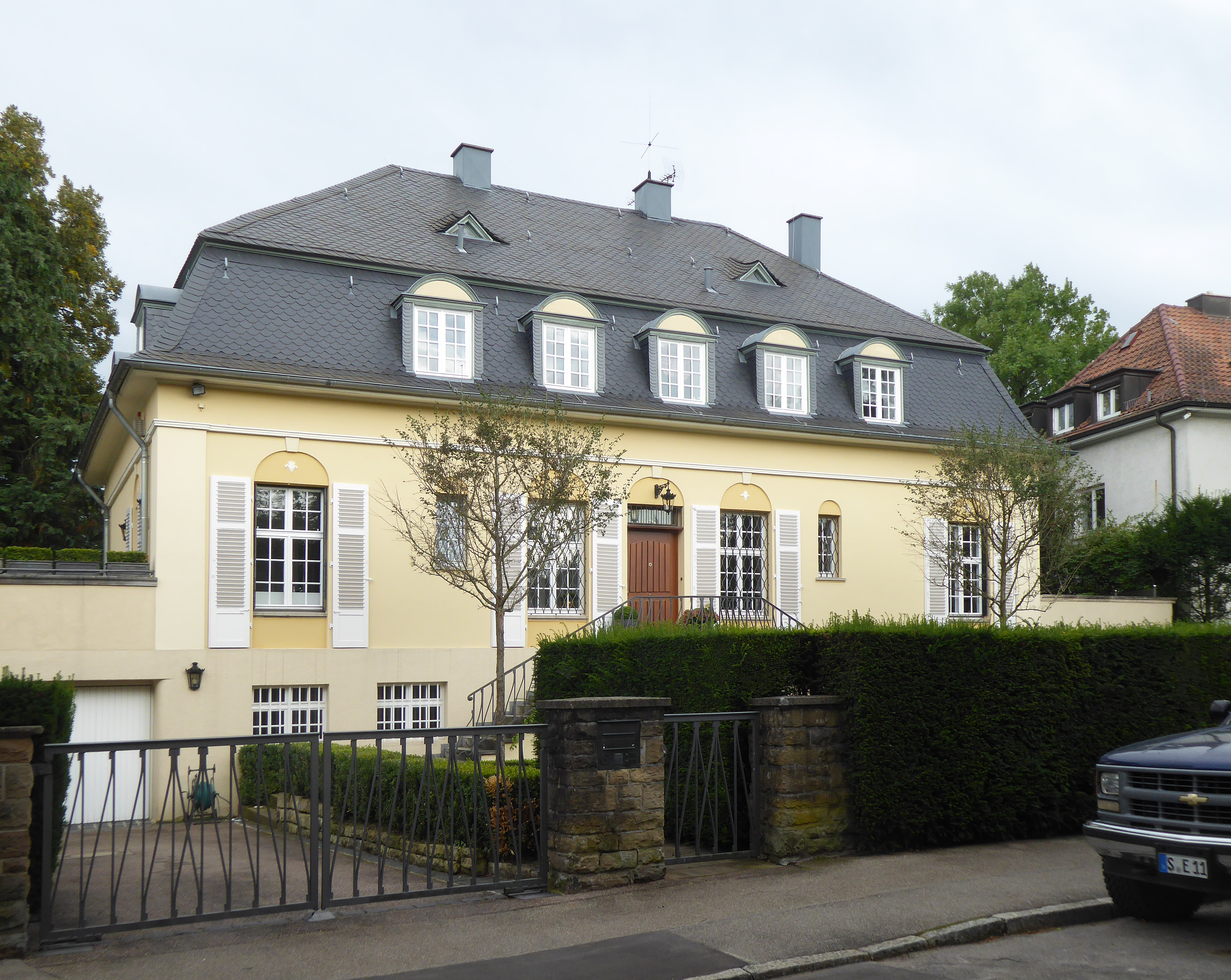 Wohnhaus Am Bismarckturm 6 in Stuttgart. Erbaut 1922 von G. Stahl und A. Bossert, Paul Darius im Stil des Neoklassizismus. Geschützt nach § 2 DSchG.